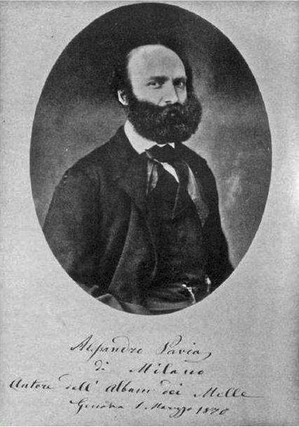 foto di Alessandro Pavia 1870